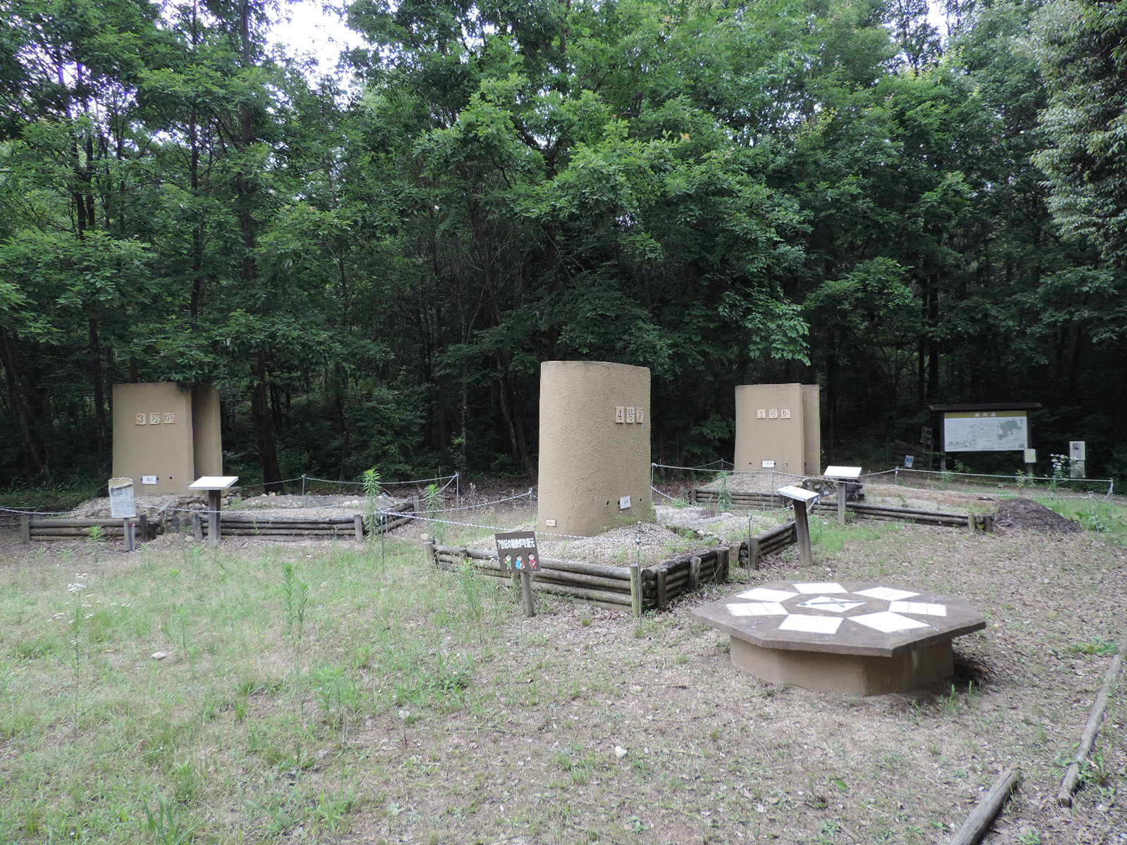 源内峠遺跡（2019年7月撮影）